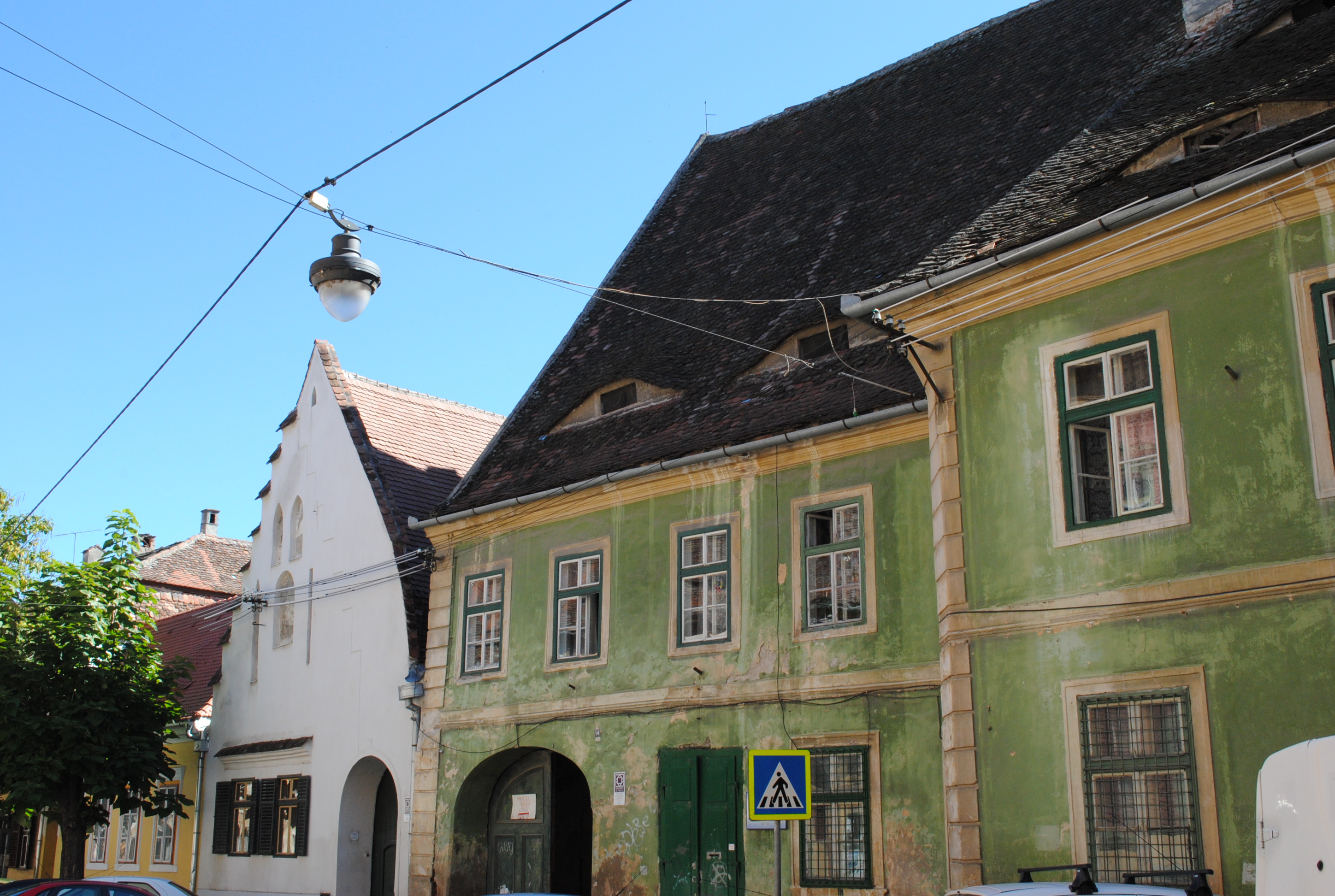 Casă, sec. XVI - XVIII